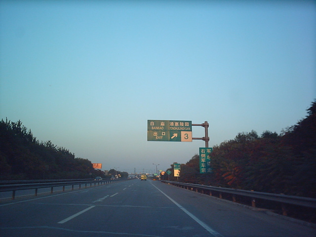 京哈高速公路 (DF08 (中文) 2004年图片)